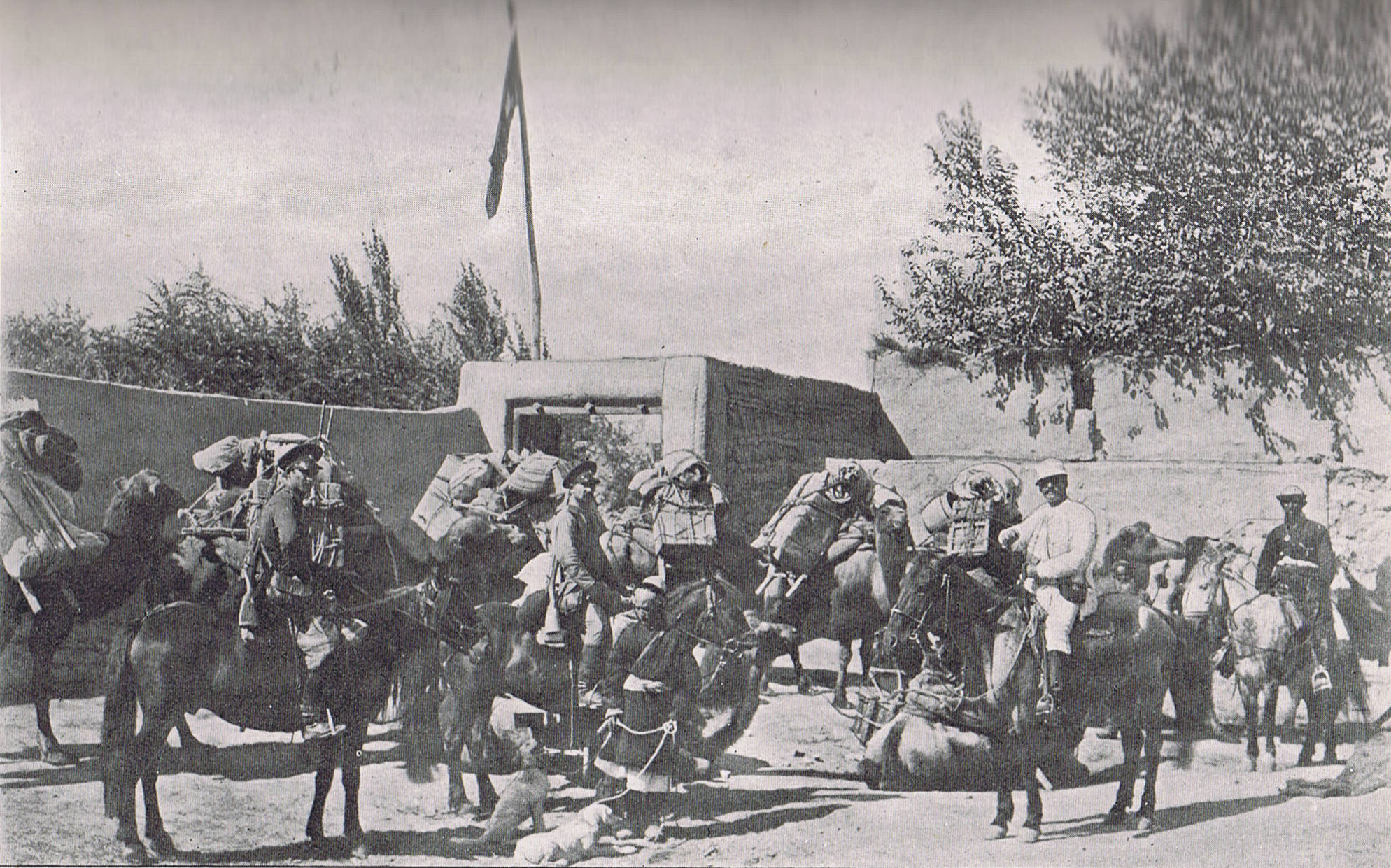 Экспедиция шведского исследователя Свена Гедина у русского консульства в Кашгаре. Фото Н. Ф. Петровского. Кашгар, 5 сентября 1899 г.